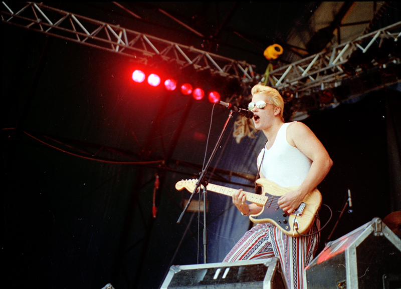 Andreas von Holst, Gitarrist der Toten Hosen, bei einem Konzert 1987 in Garching bei München.